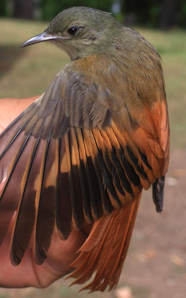 Sittasomus griseicapillus Birds of Serranía de Perijá of Colombia and Venezuela (Ornitologia Colombiana [2014] 14: 62–93)